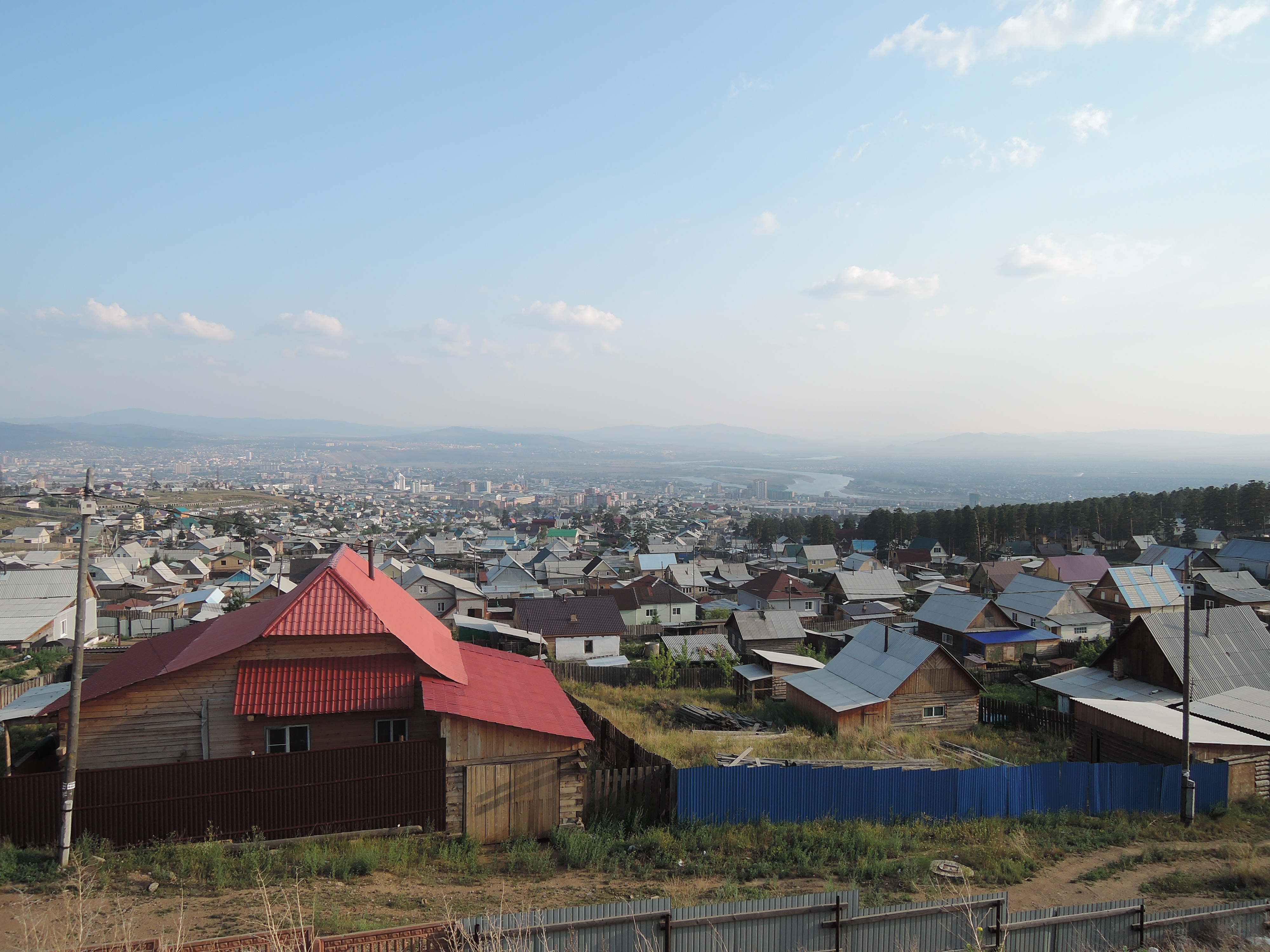 Pohled na Ulan-Ude z Lysoj gory od dacanu Rinpoče Bagša